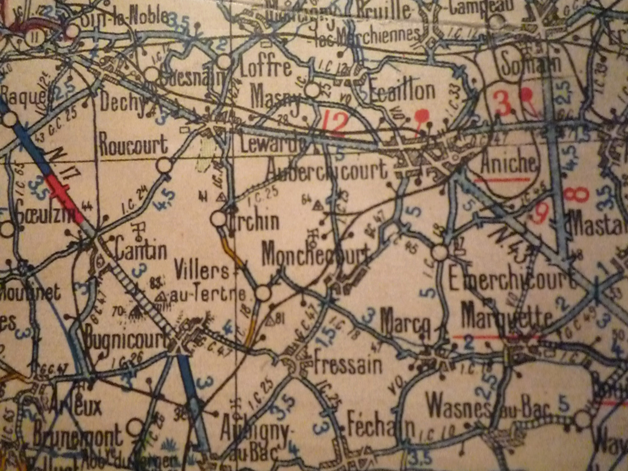 Tracé de l'ancienne Ligne Aubigny-au-Bac - Somain, Nord-Pas-de-Calais, France